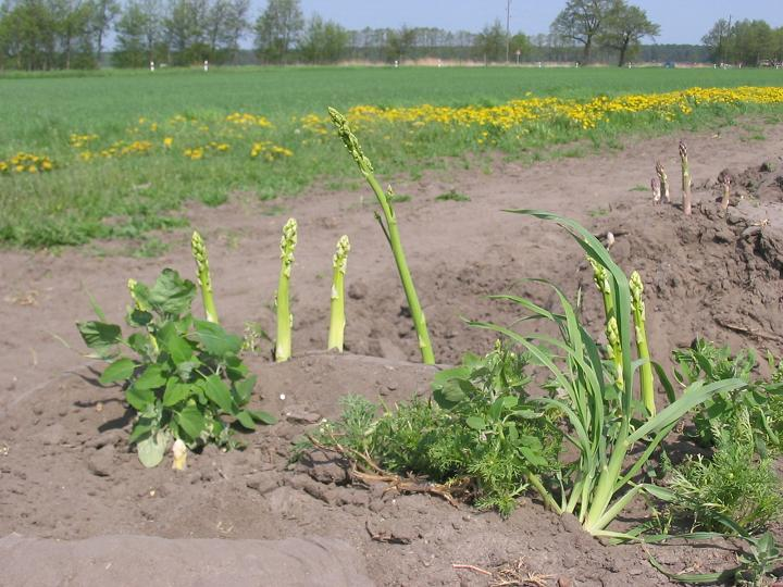 Beelitzer Sander mit Spargel, Brandenburg